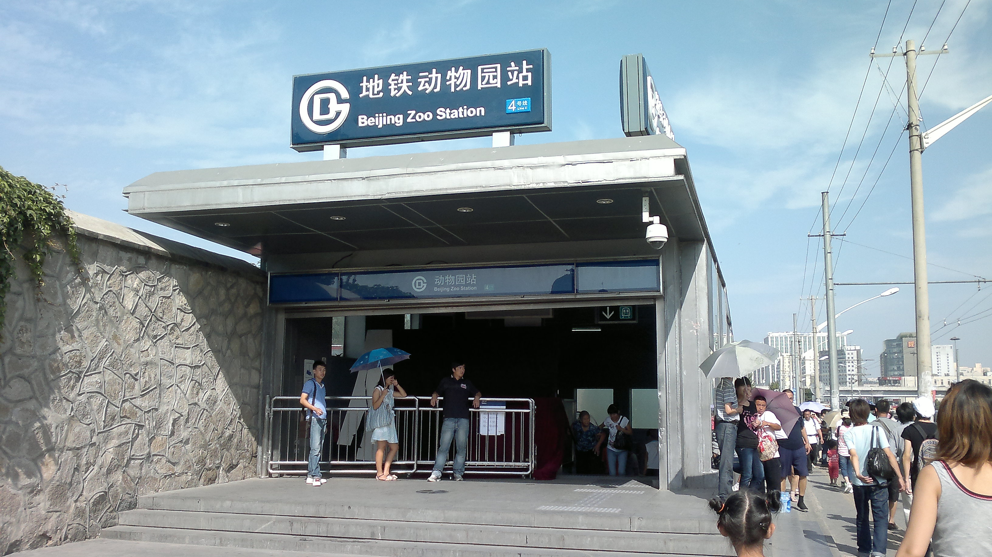 北京地鐵4號綫動物園站